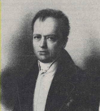 Bildnis Christian Wilhelm Schweitzer (1781–1856)